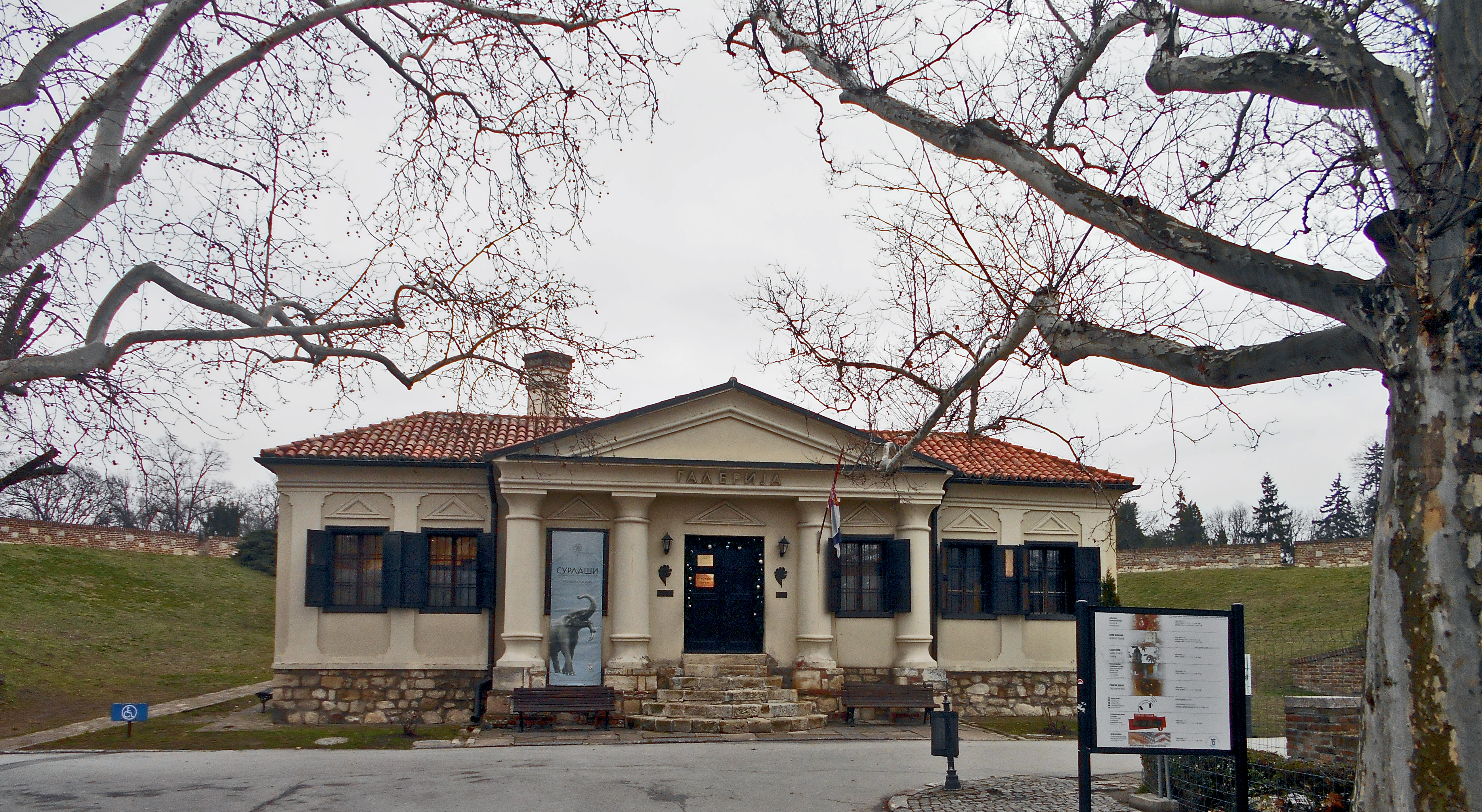 Galerija Prirodnjačkog muzeja na Kalemegdanu